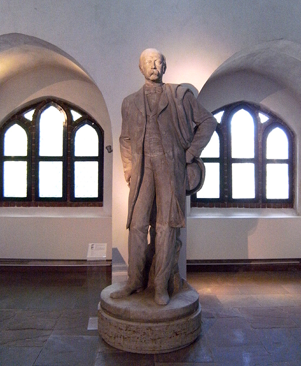 Märkisches Museum, Berlin (Stiftung Stadtmuseum) Statue von Max Klein (Schwiegersohn von Hedwig Dohm) zeigt Theodor Fontane. Nach 1908 von Fritz Schaper vollendet für den Tiergarten.